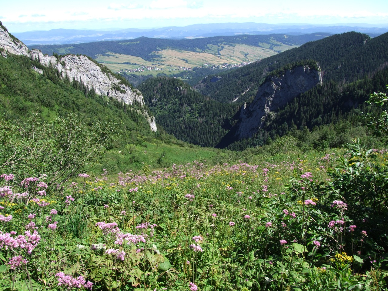 Szeroka Dolina Bielska (Široka dolina) w Tatrach Bielskich (jej dolna część). Po lewej stronie widocznej bramy skalnej Głośna Turnia, w środku (poniżej)Opalona Turnia i Opalone siodło, po prawej Łasztowica